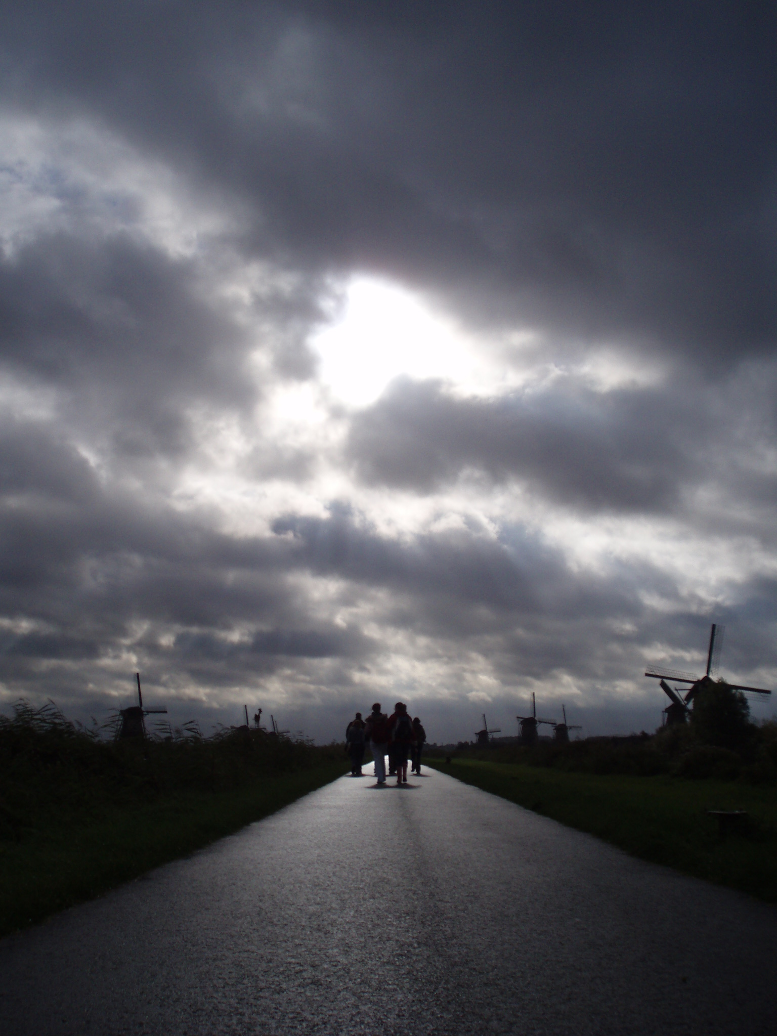 Kinderdijk Mills, Netherlands